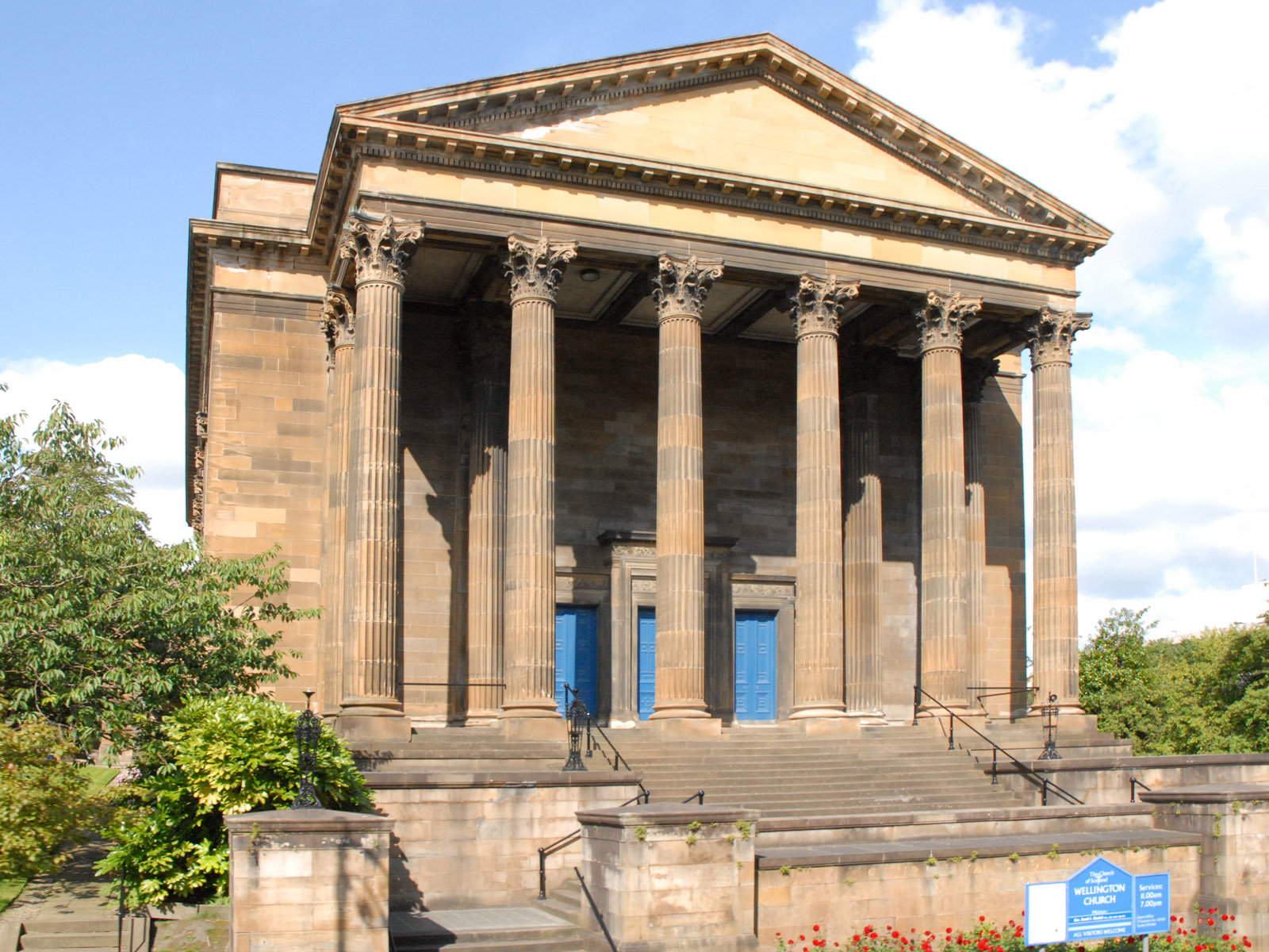 L'Eglise Wellington (Avenue de l'Université) se trouve dans le quartier Hillhead de Glasgow. Son architecture est inspirée des temples grecs anciens comme beaucoup d'églises de cette époque. Sa façade possède un portique néoclassique, et une colonnade corinthienne. Ce type d'architecture avait la faveur de l'église presbytérienne d'Ecosse, au 19e siècle. L'architecte qui a conçu le bâtiment, dans les années 1870, est Thomas Lennox Watson